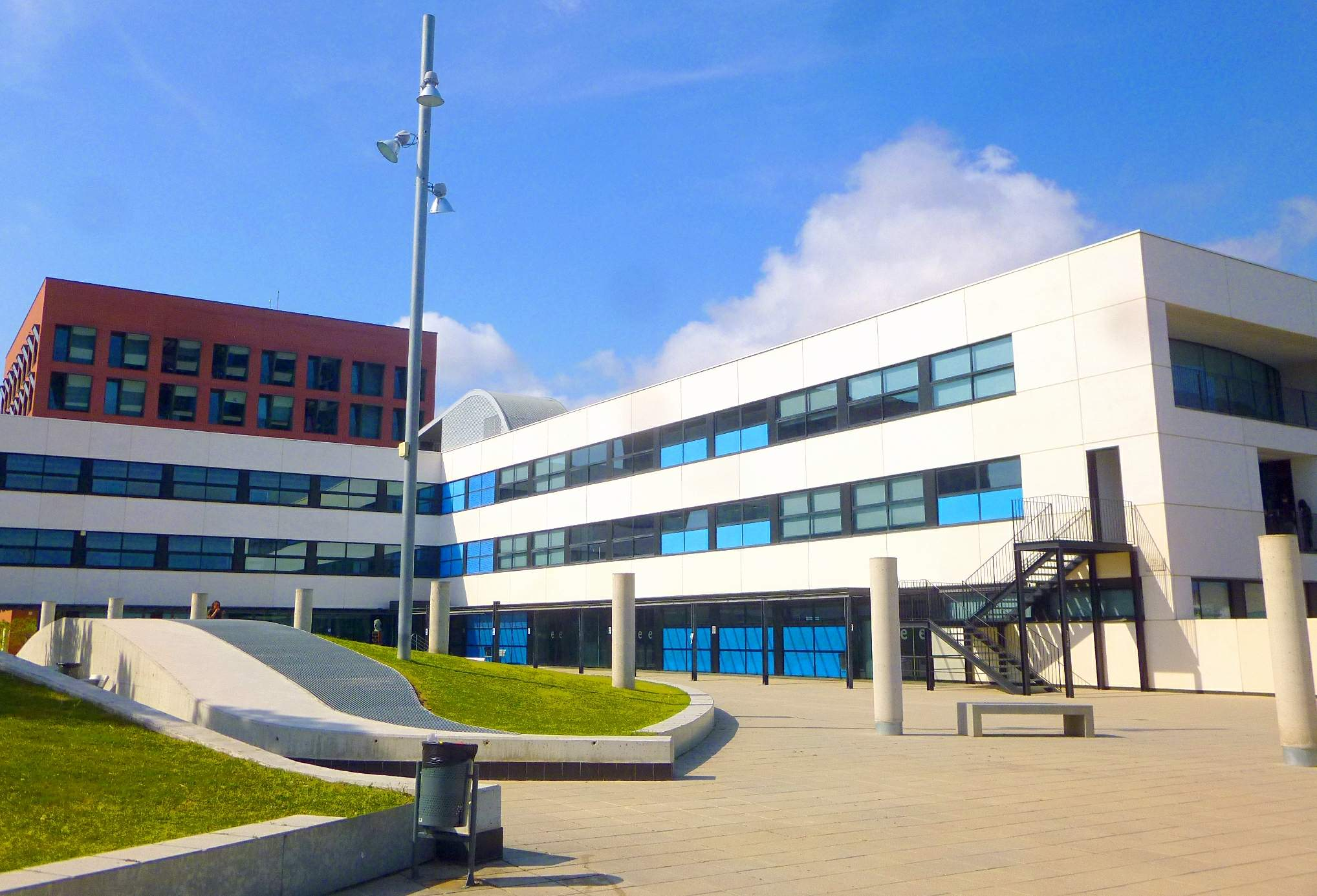 TecnoCampus Mataró-Maresme, Edifici Universitari TCM1, en Mataró (provincia de Barcelona). Alberga la Escola Superior Politècnica TecnoCampus (ESUPT), la Escola Superior de Ciències Socials i de l'Empresa TecnoCampus (ESCSET) y la Escola Superior de Ciències de la Salut TecnoCampus (ESCST). Los tres centros están adscritos a la Universidad Pompeu Fabra (UPF)